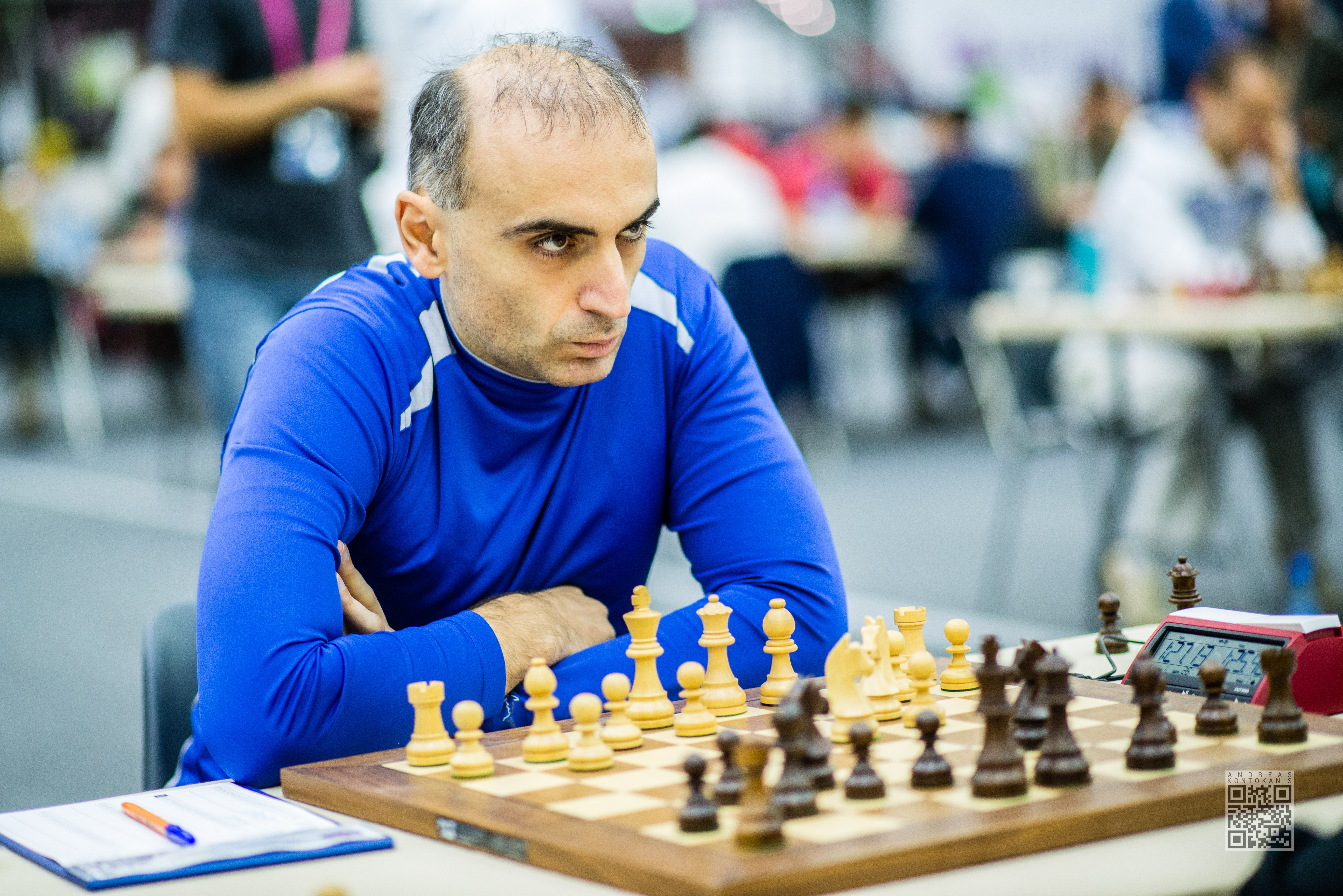 Mchedlishvili Mikheil